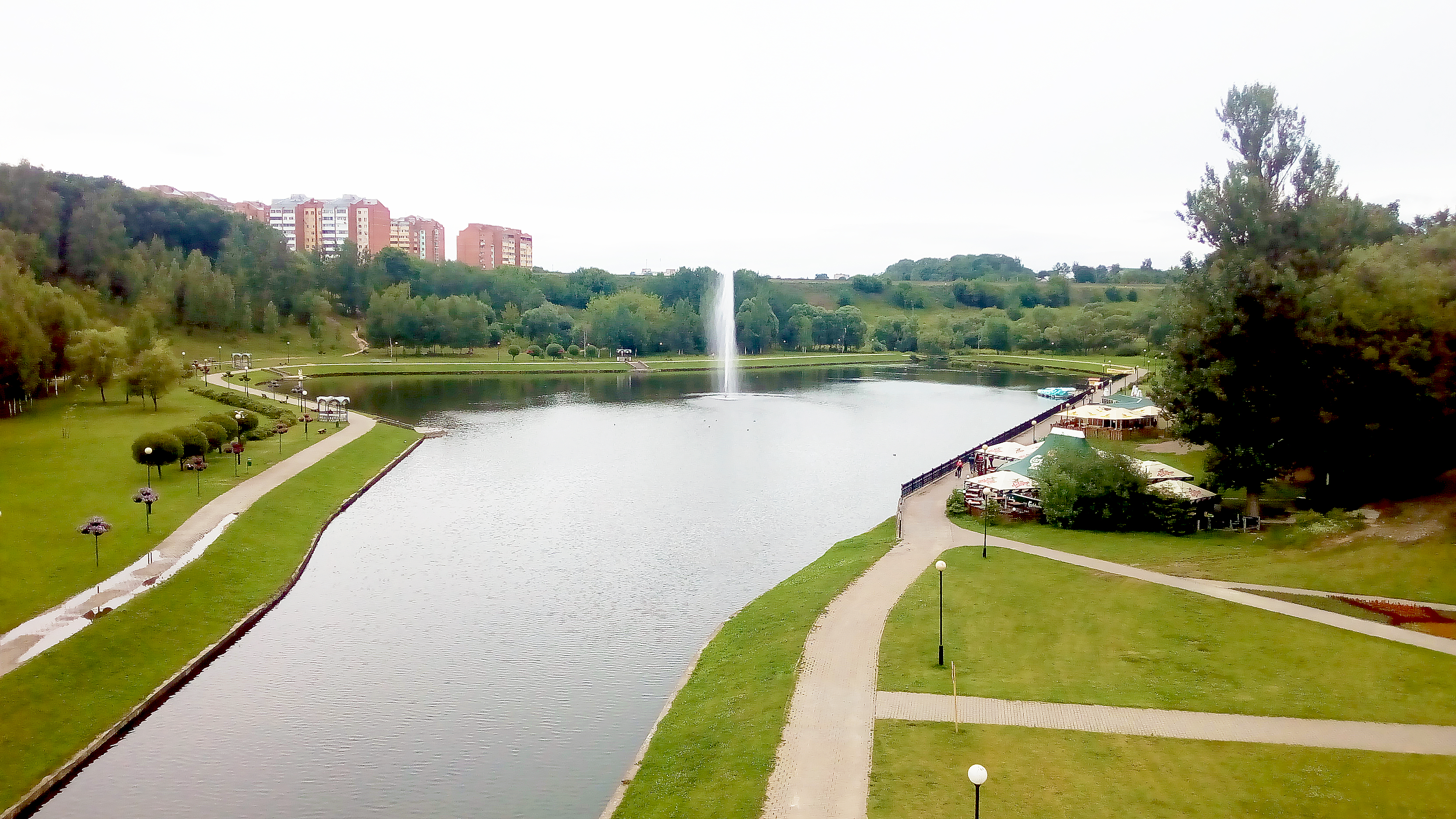 Дубравенка ў Магілёве